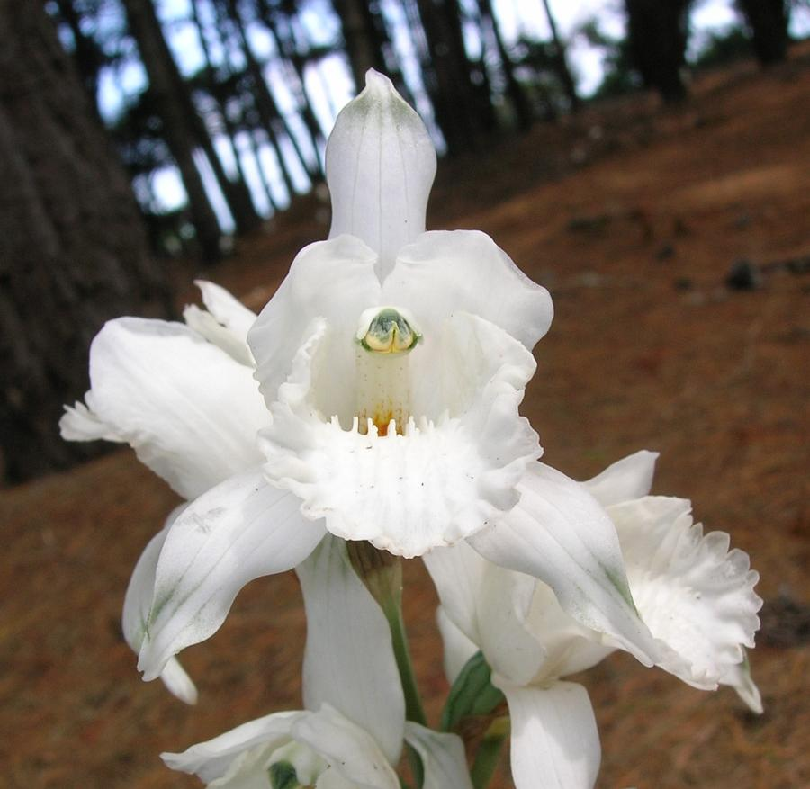 Flor de Orquidea Chloraea crispa